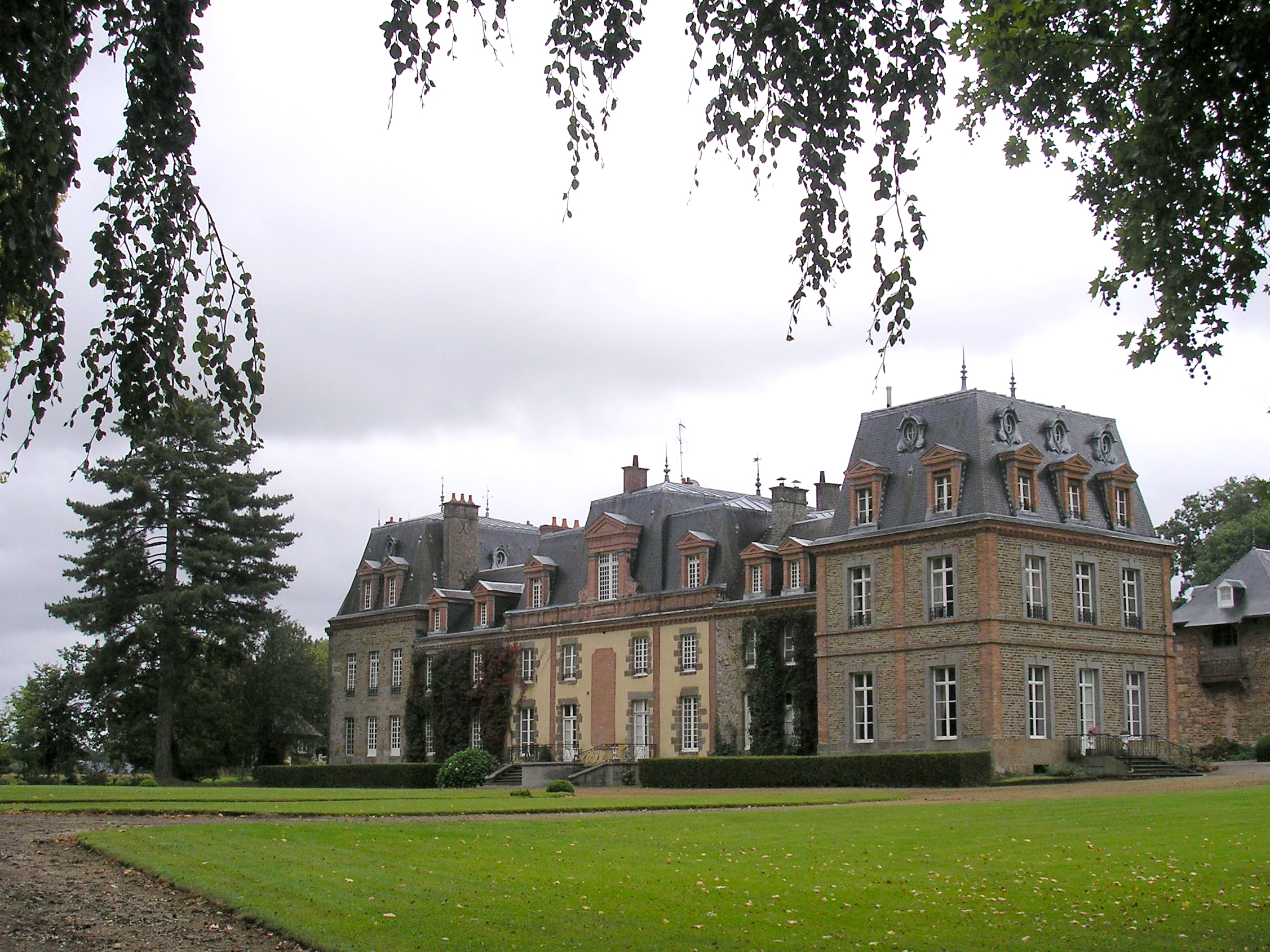 Thubœuf (Pays de la Loire, France). Le château de Chantepie.